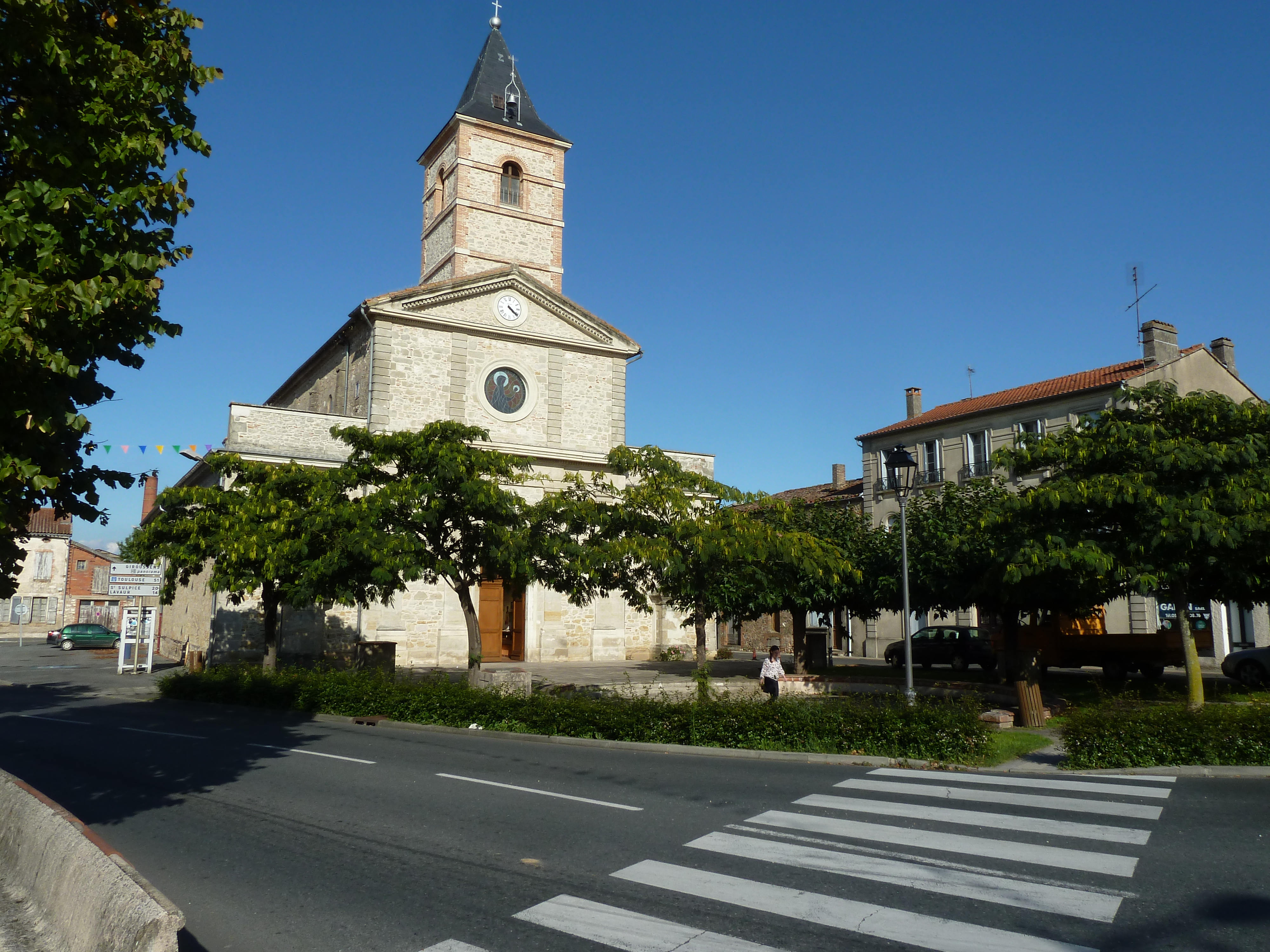 Briatexte (Tarn) - Notre Dame de Beaulieu